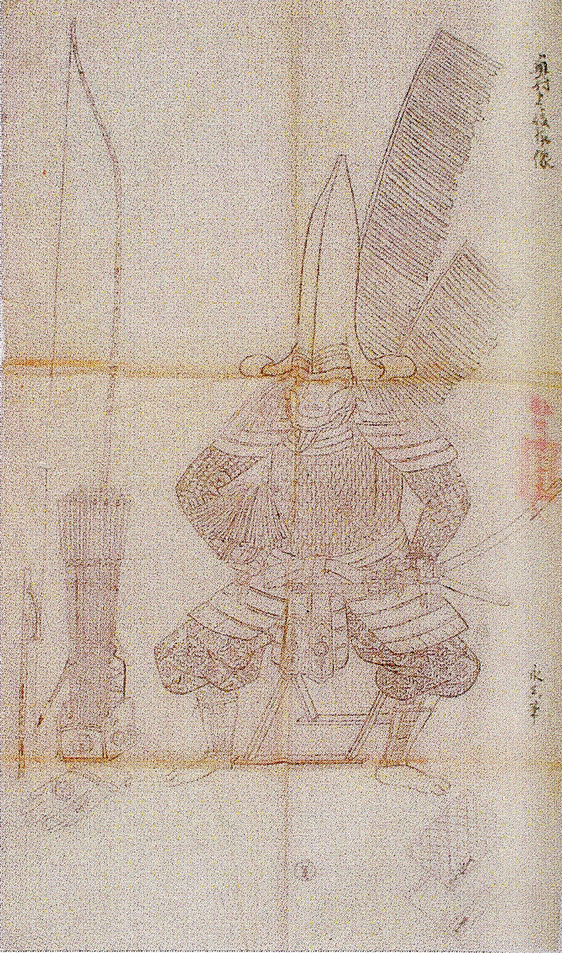 加賀八家奥村分家2代当主・奥村庸礼の肖像画粉本。